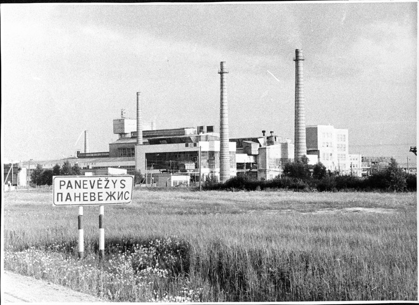 Nuotrauka Panevėžyje, Janonio gatvė, buvusi Lietkabelio gamykla